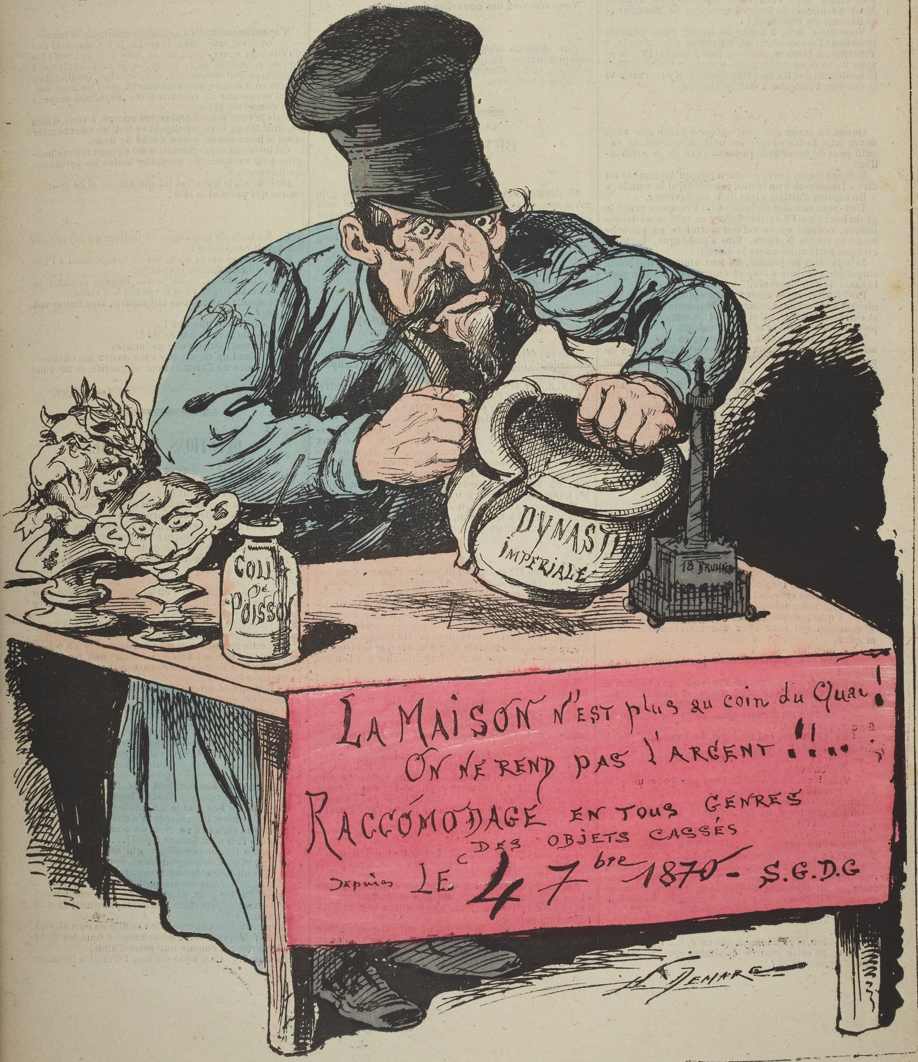 Caricature de Napoléon III parue dans La Nouvelle lune, dimanche 6 juin 1880.